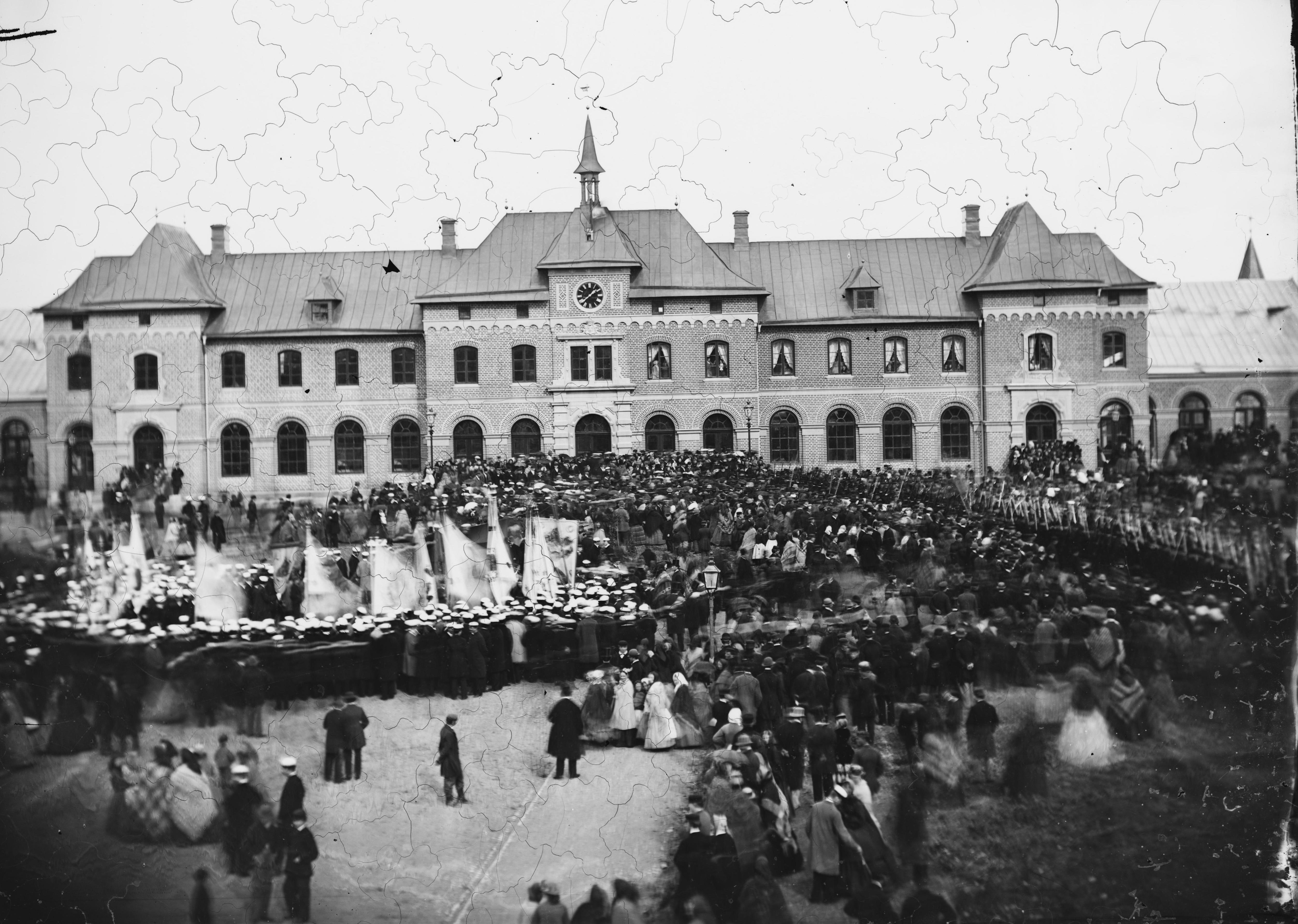 Sted: Uppsala Kommune: Uppsala Fylke: Uppsala Tagger